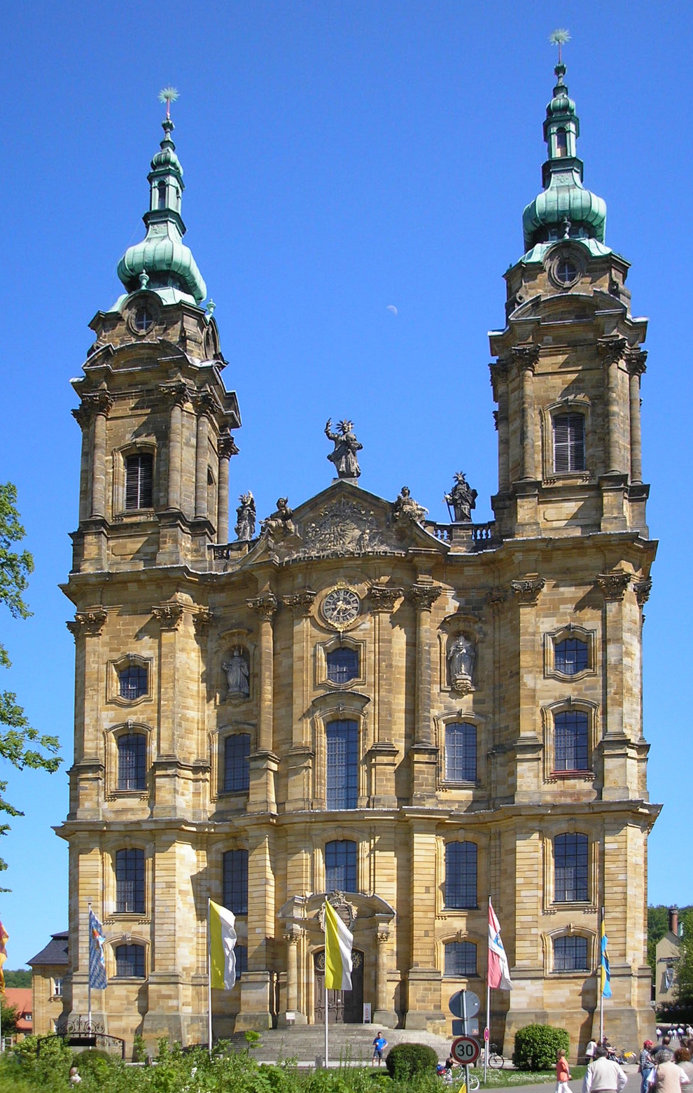 Die Fassade von Vierzehnheiligen (Oberfranken).